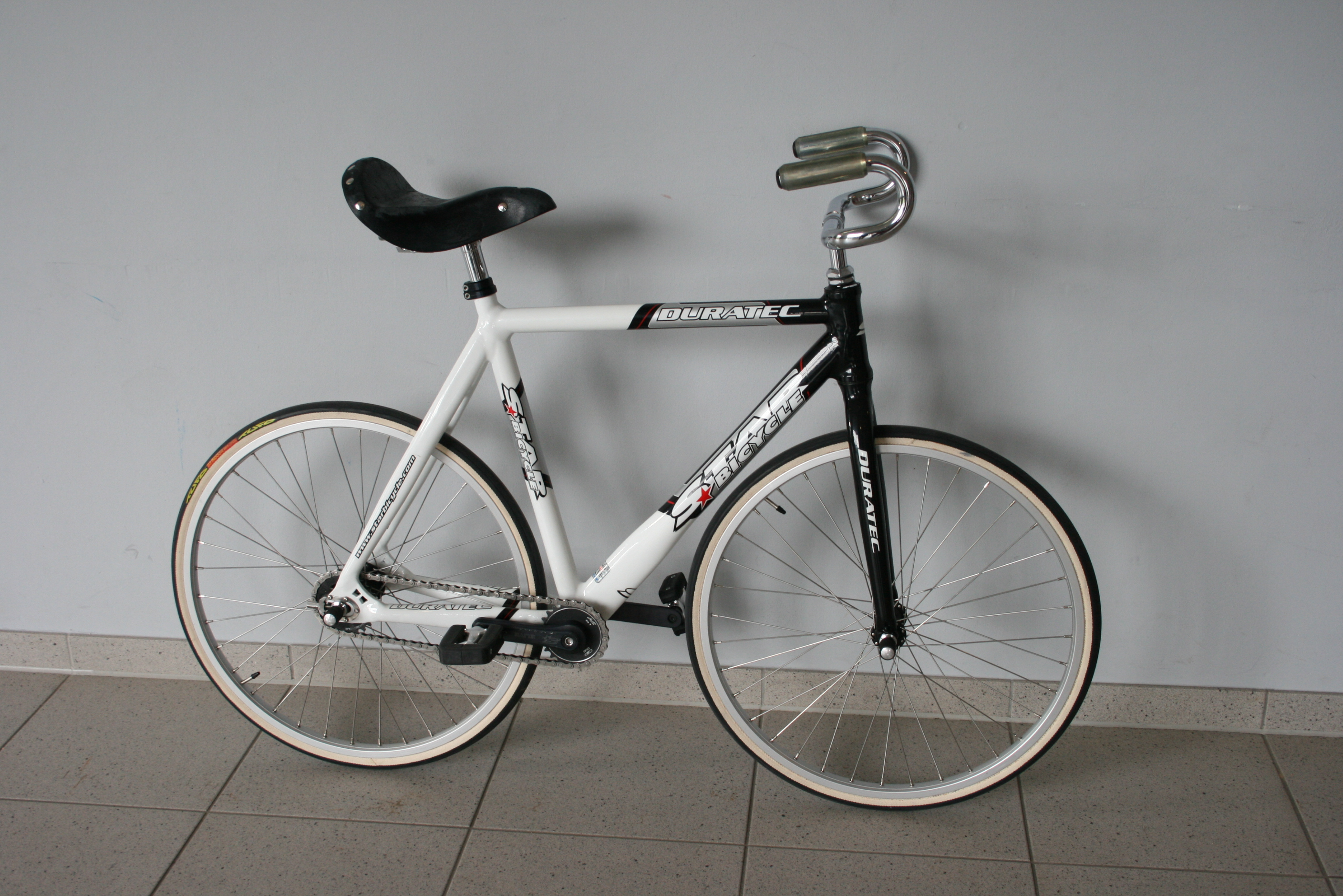 Aktuelles Kunstrad